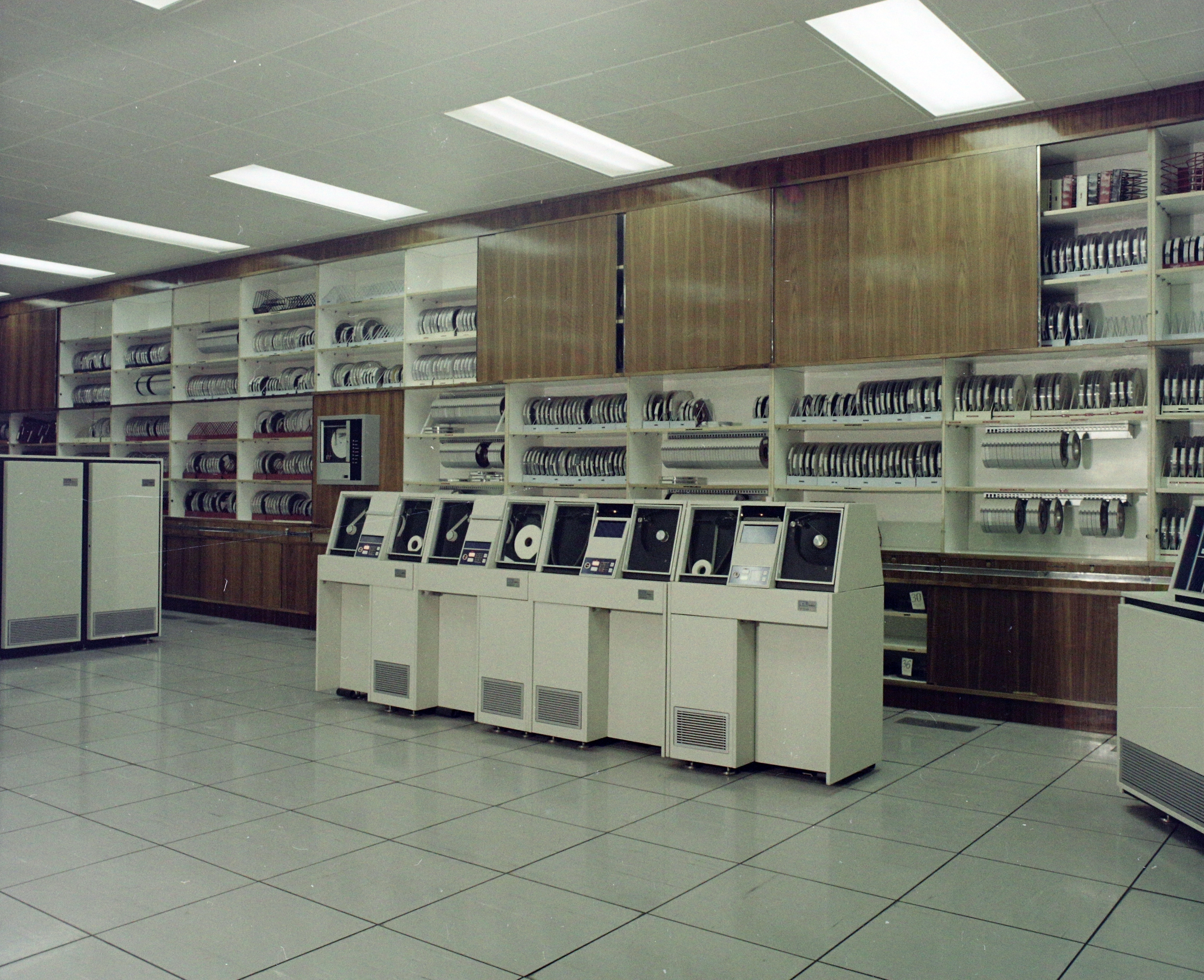 Angol utca 27., az Országos Tervhivatal számítóközpontja, ICL SYSTEM 4-70 típusú számítógép. Location: Hungary, Budapest XIV. Tags: colorful, computer, Budapest Title: Angol utca 27., az Országos Tervhivatal számítóközpontja, ICL SYSTEM 4-70 típusú számítógép.